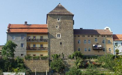 Úštěk - dům Habřinská stráň čp. 9, Pikartská věž (Panský dvůr čp. 87), dům Panský dvůr čp. 8, část domu Panský dvůr čp. 7, pohled od jihu